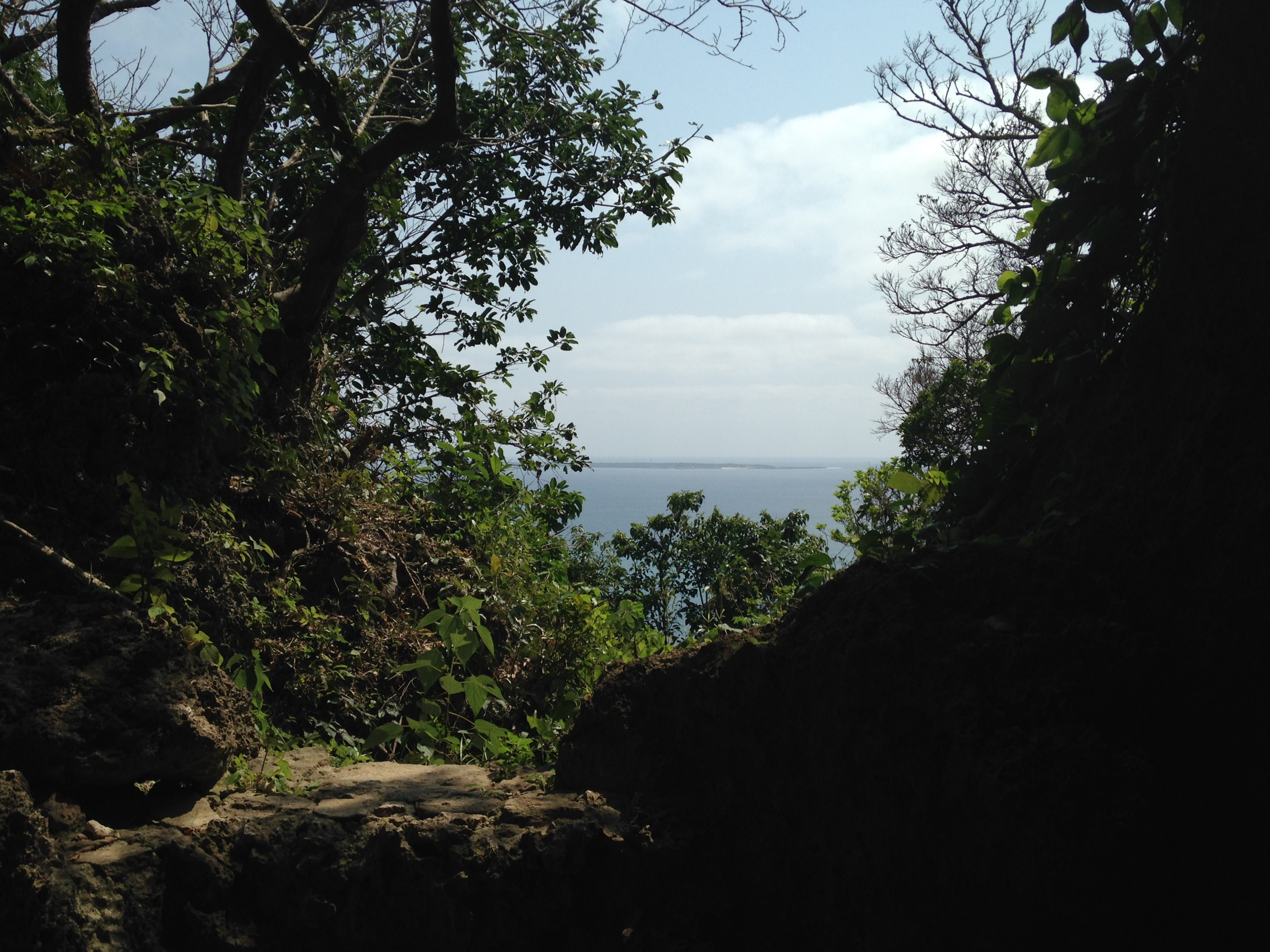 斎場御嶽三庫理の久高島遥拝所より望む久高島